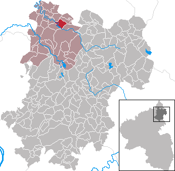 Streithausen in Rhineland-Palatinate - Westerwaldkreis